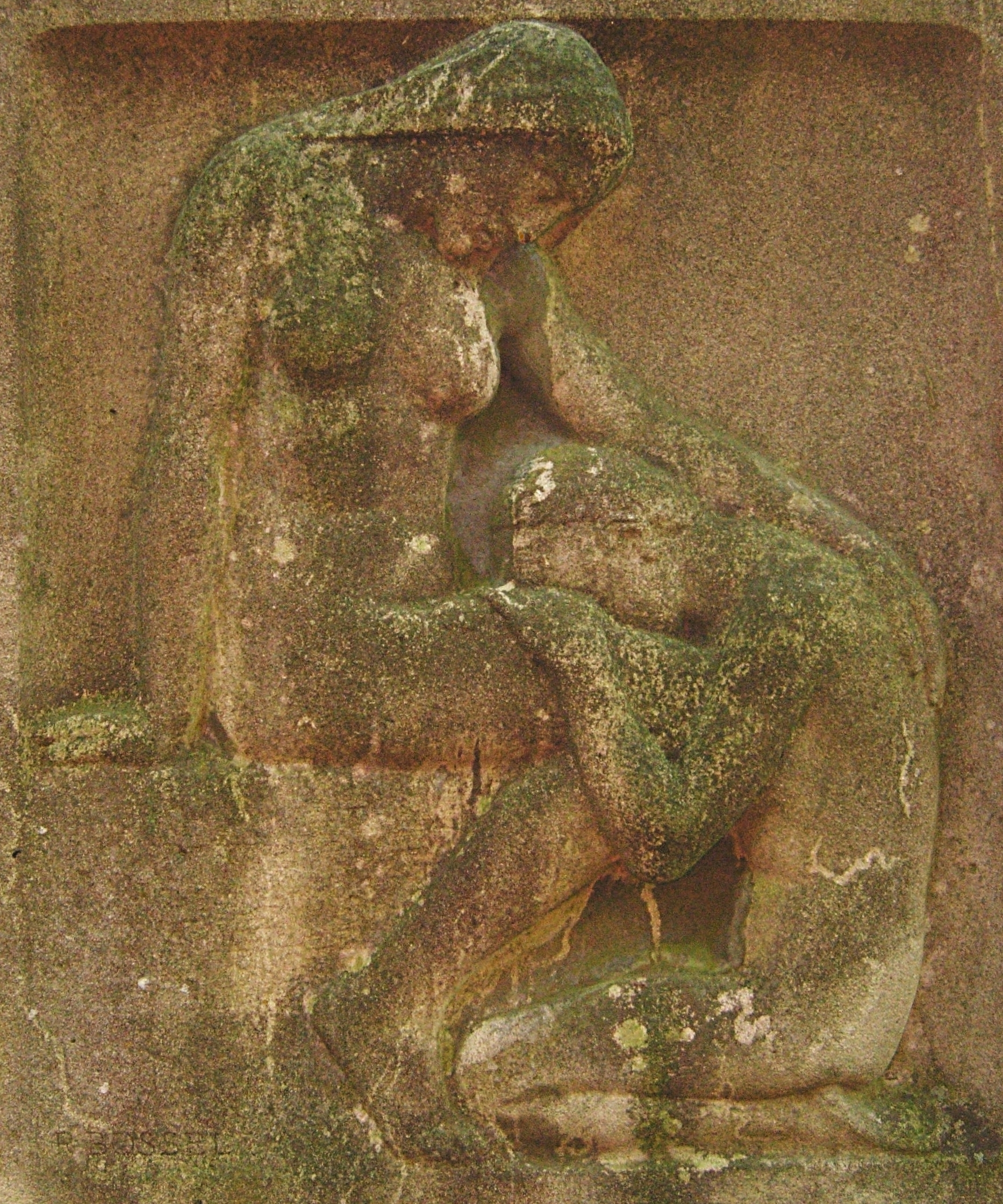 Rudolf Bosselt: Jugendstil-Relief für Richard Zuntz (* 25. Oktober 1863, † 20. Dezember 1910) auf dem Poppelsdorfer Friedhof in Bonn. Richard ist ein Enkel von Rachel Zuntz, Gründerin der Kaffeerösterei A. Zuntz sel. Wwe., deren Geschäftsführer er war (als Nachfolger seines Vaters Leopold und seines Bruders Josef), sowie ein Bruder des Arztes und Physiologen Nathan (eines Schülers von Eduard Pflüger). Vermutlich ist auch Richard (wie sein Bruder Nathan) zum Christentum konvertiert (daher das Bildwerk und sein Grab auf diesem Friedhof).